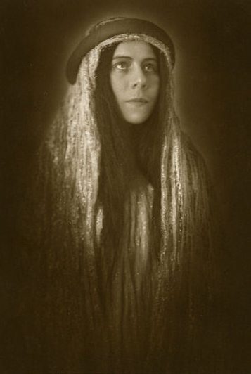 Enid Szantho als Erda, Bayreuther Festsspiele